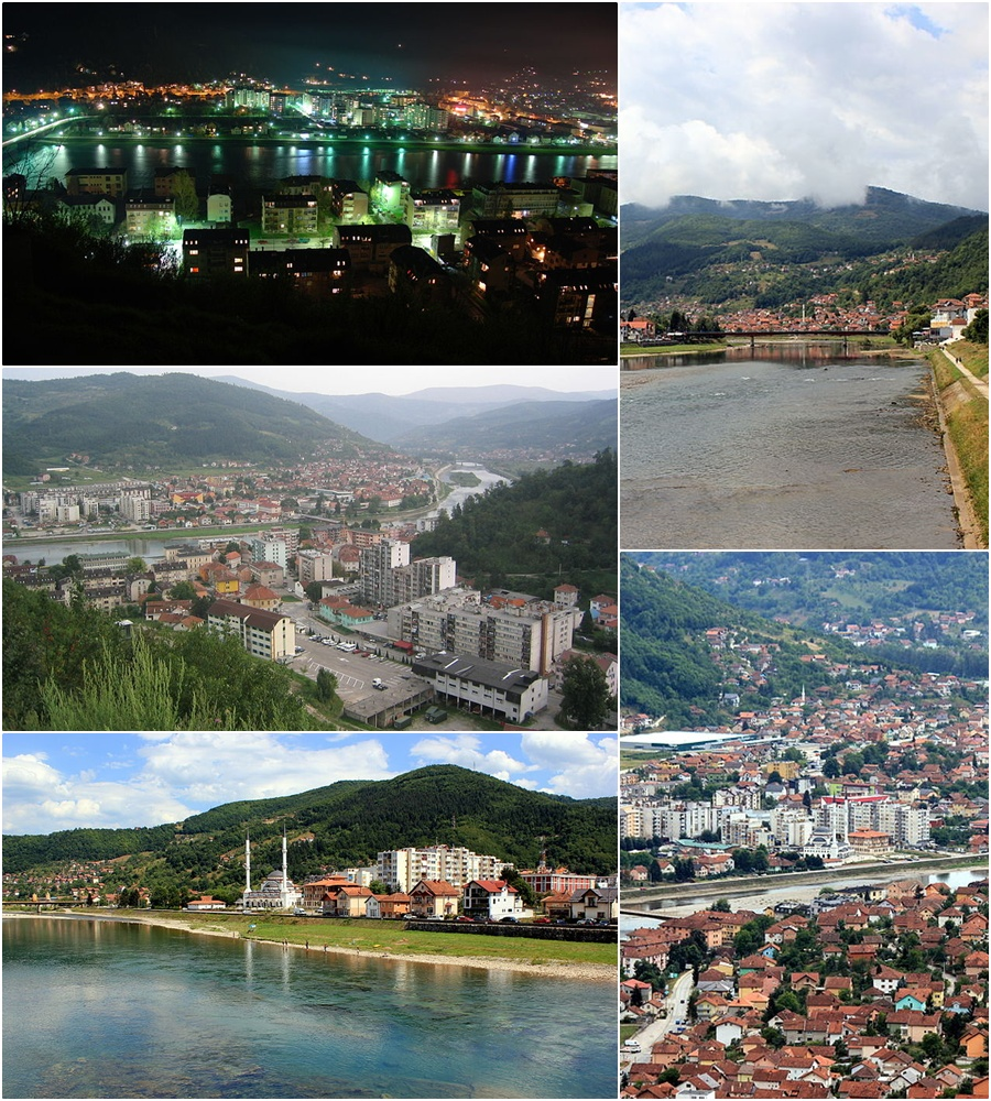 Goražde